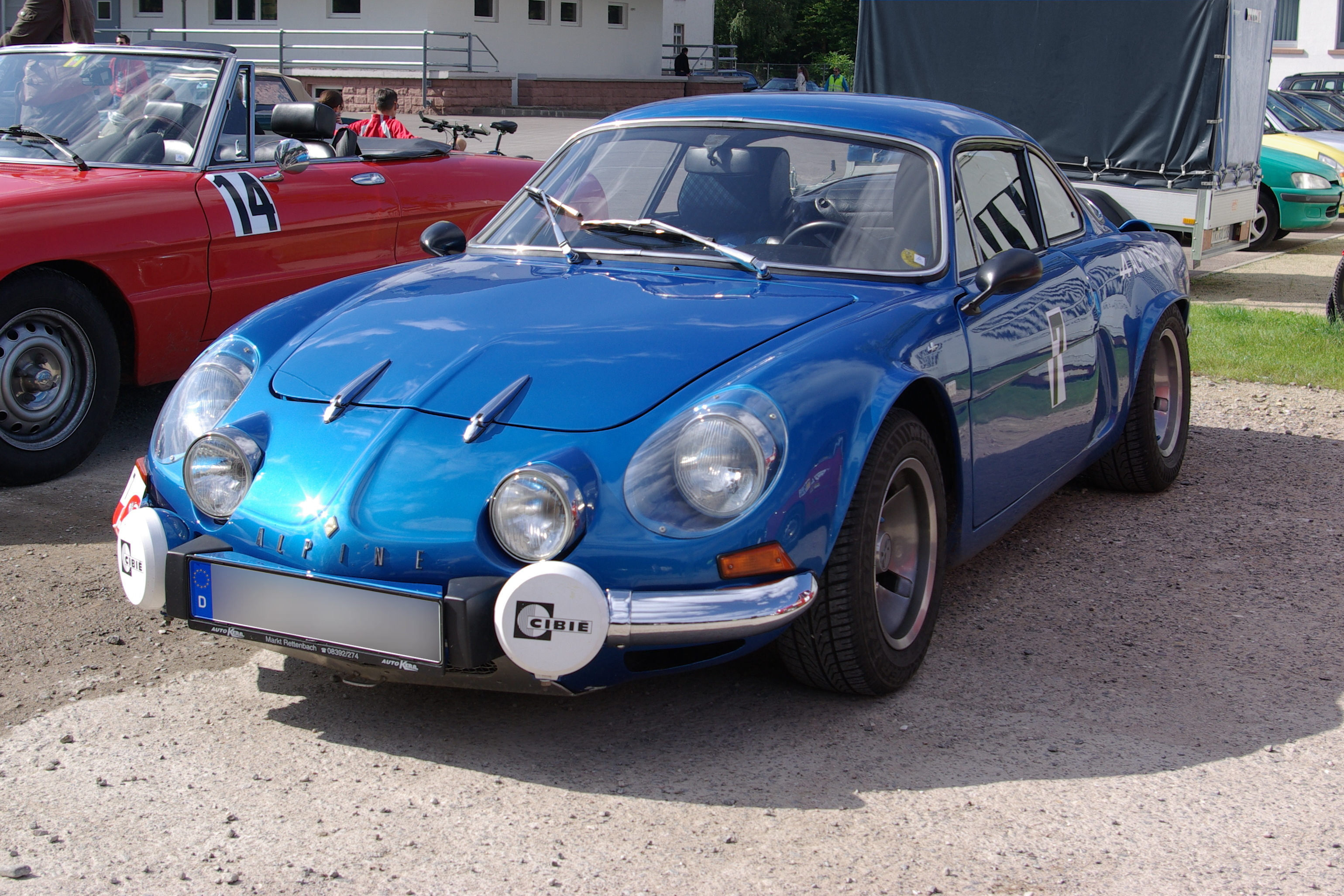 Alpine Renault berlinette 1600 SX A110 Baujahr 1977